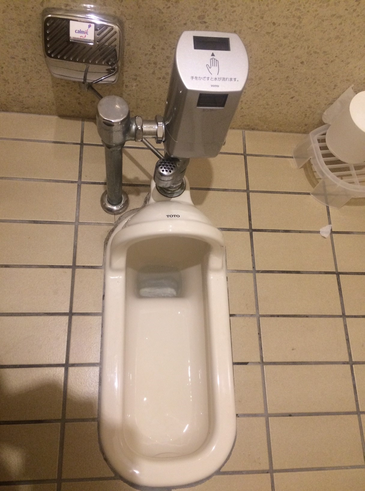 TOTO C375V+Calmic-MK-7